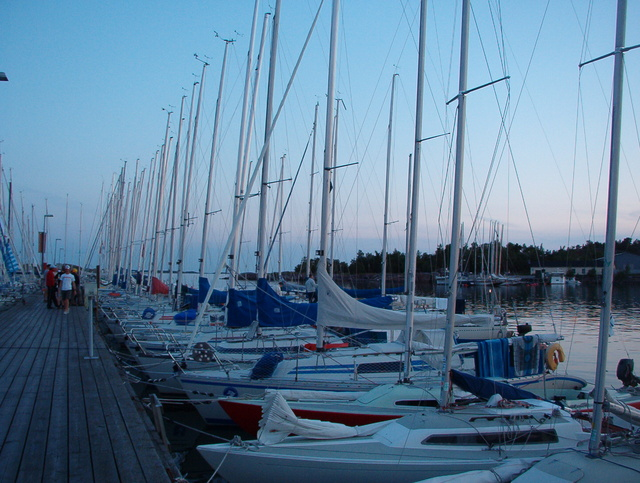 En bild från bryggan i östra hamnen där båtarna är samlade kvällen före Hangö Regattan börjar. I förgrunden H-båtar, sedan Finn Express 83:or.